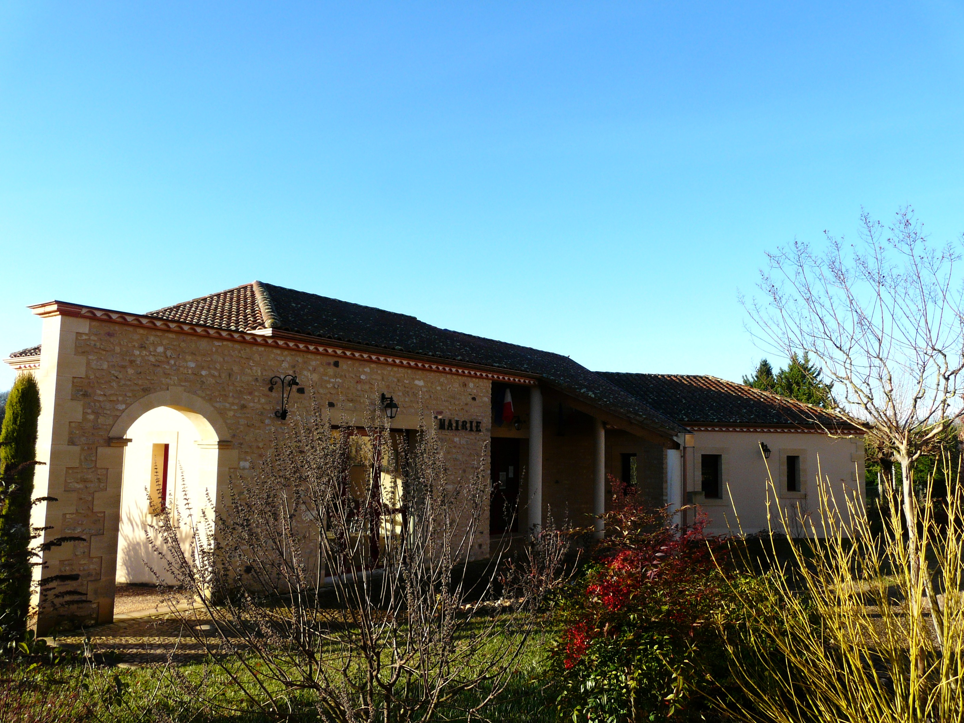 La mairie de Veyrines-de-Vergt, Dordogne, France.